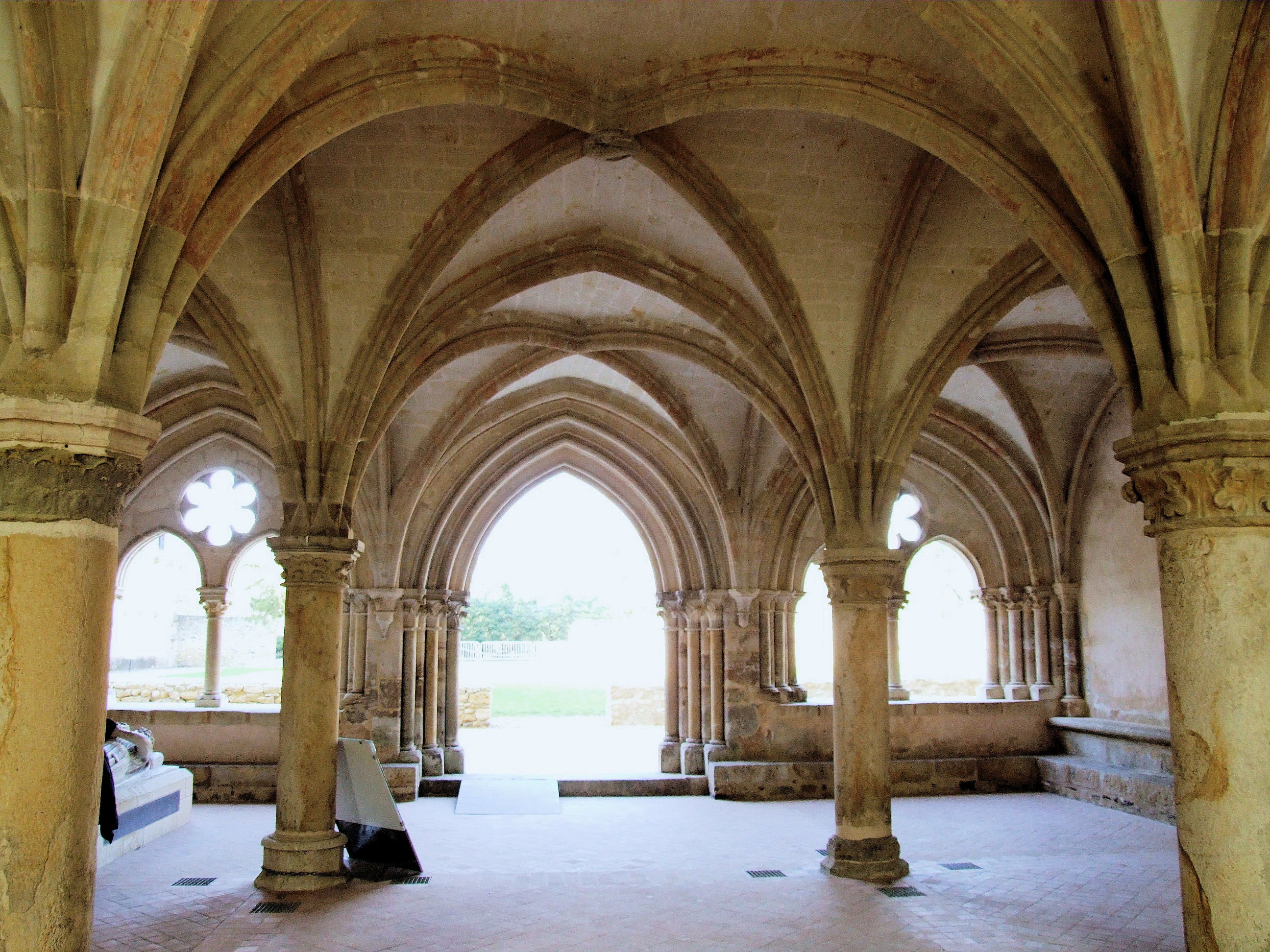 Abbaye de l'Epau - Salle capitulaire